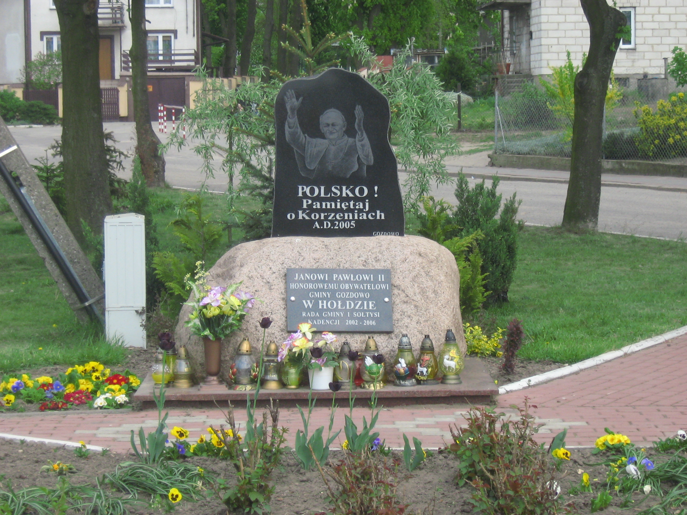 Tablica pamiątkowa w Gozdowie poświęcona Janowi Pawłowi II